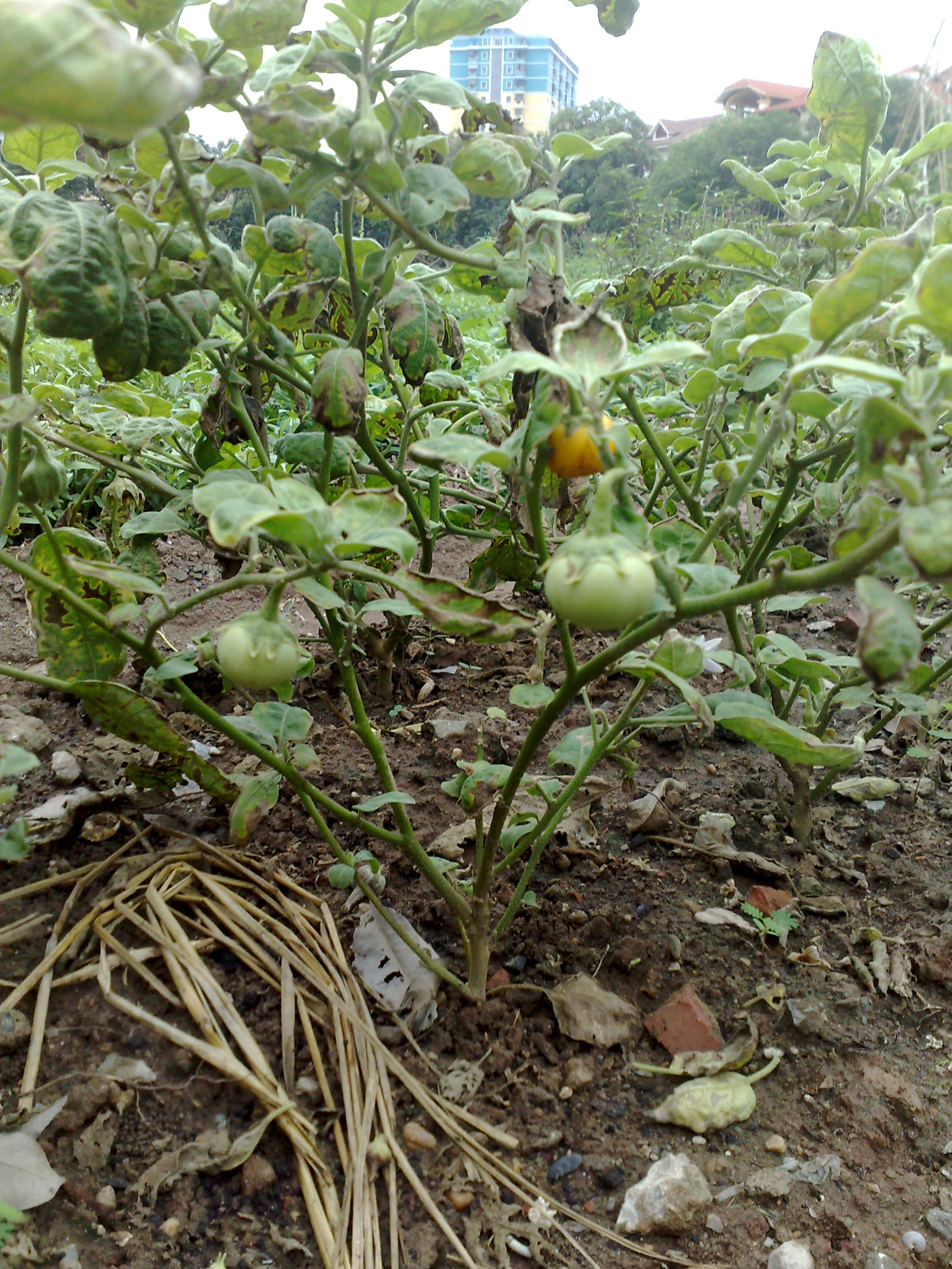 Hình cây cà pháo do tôi tự chụp và tải lên để minh hoạ cho bài viết Cà pháo.